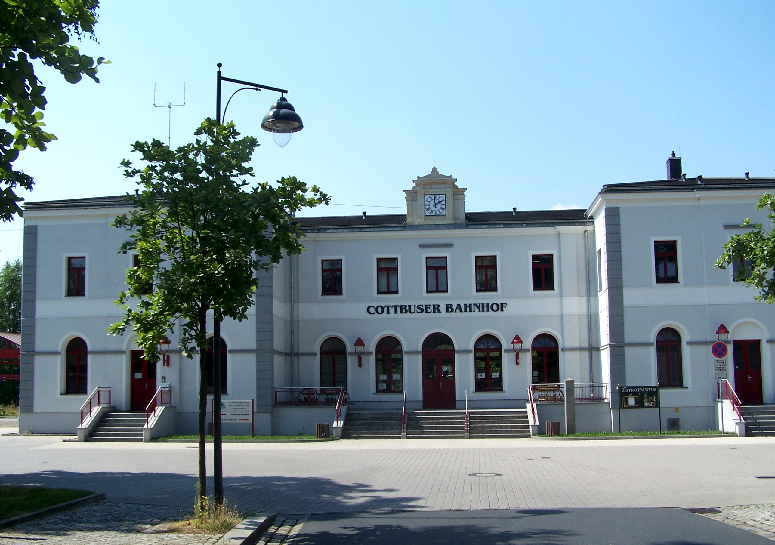 Cottbusser Bahnhof in Großenhain, Trainstation "Cottbusser Bahnhof" in Großenhain